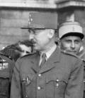 מארי-פייר קניג 1944